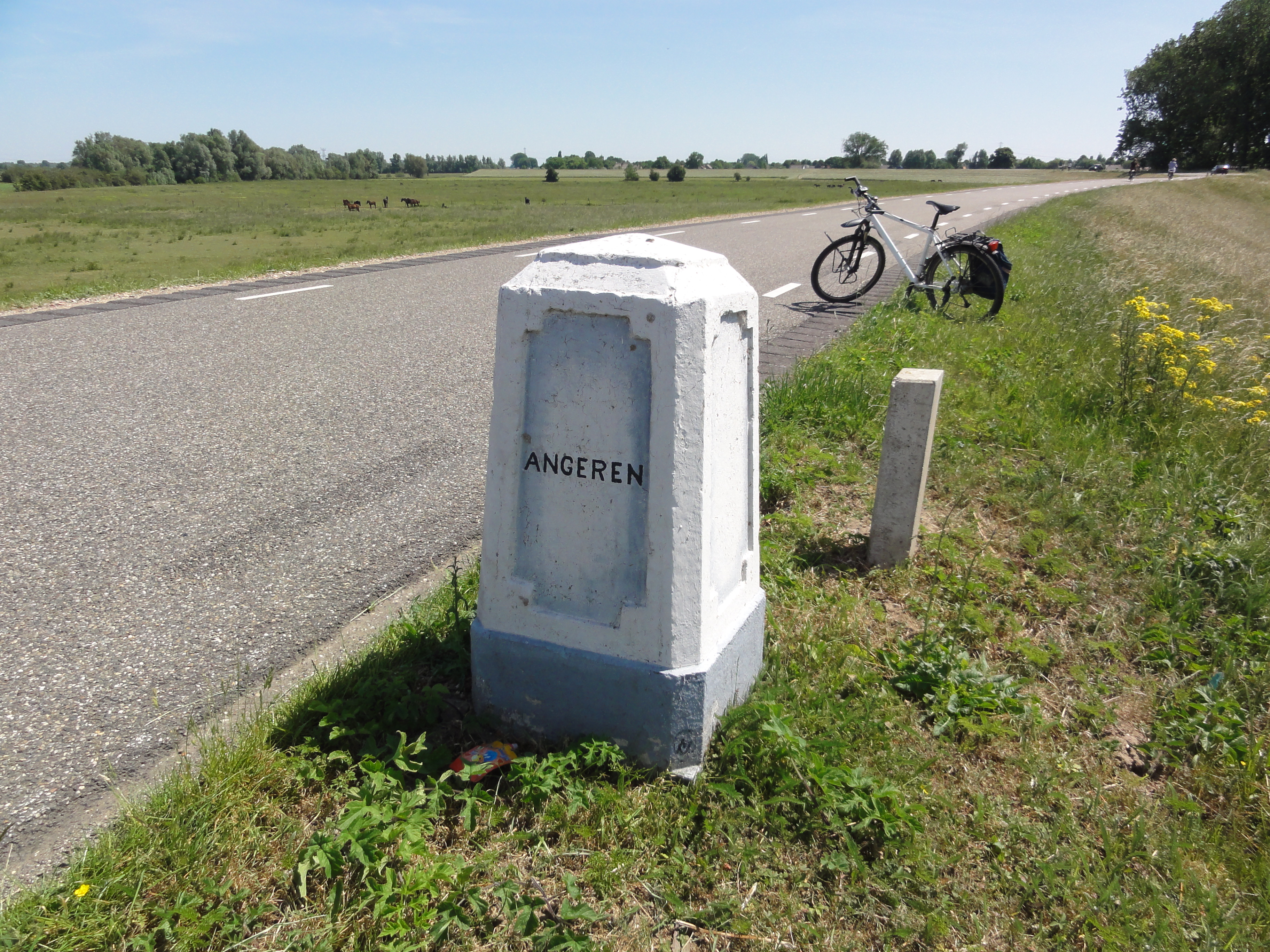 Rijndijk Grenspaal 02 rechts, Angeren ~ Huissen.